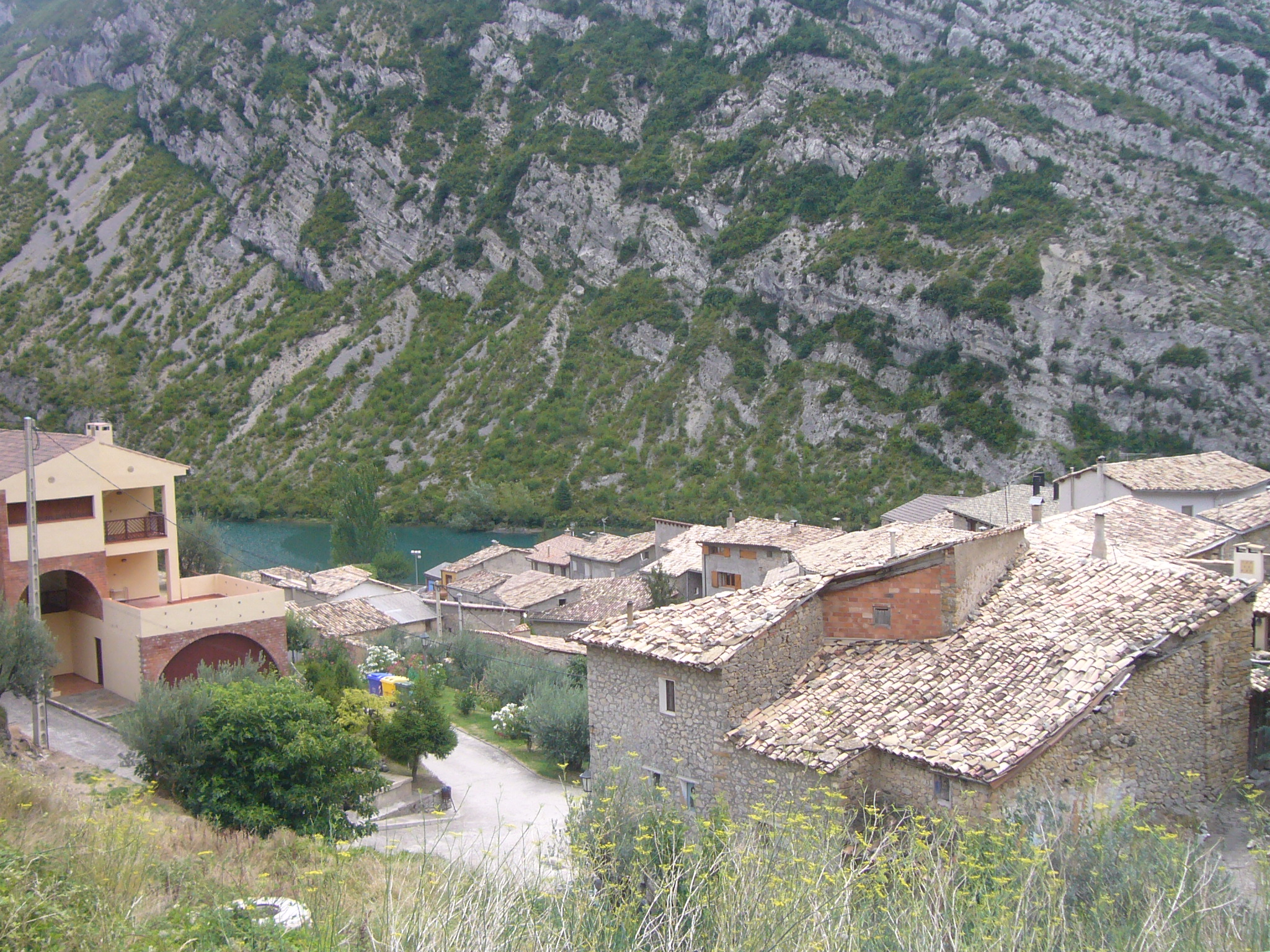 Sopeira vist des de la carretera, amb el Noguera Ribagorçana al fons